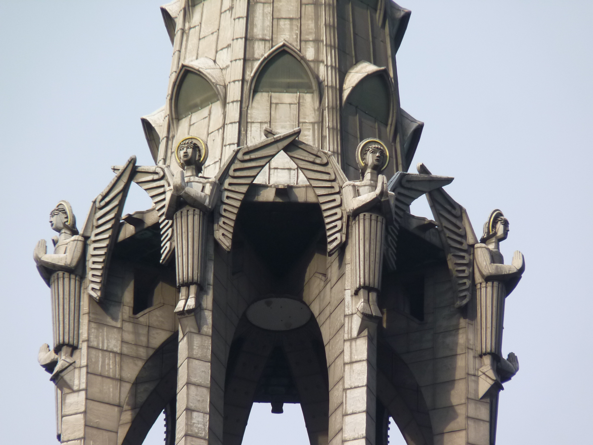 Engel am neuen Vierungsturm von 1959–1962 von Dombildhauer Erlefried Hoppe (1910–1992). Art déco. Die acht Engel sollen 4,10 m hoch sein, je 2,25 t wiegen und aus bleiverkleidetem Lärchenholz bestehen.